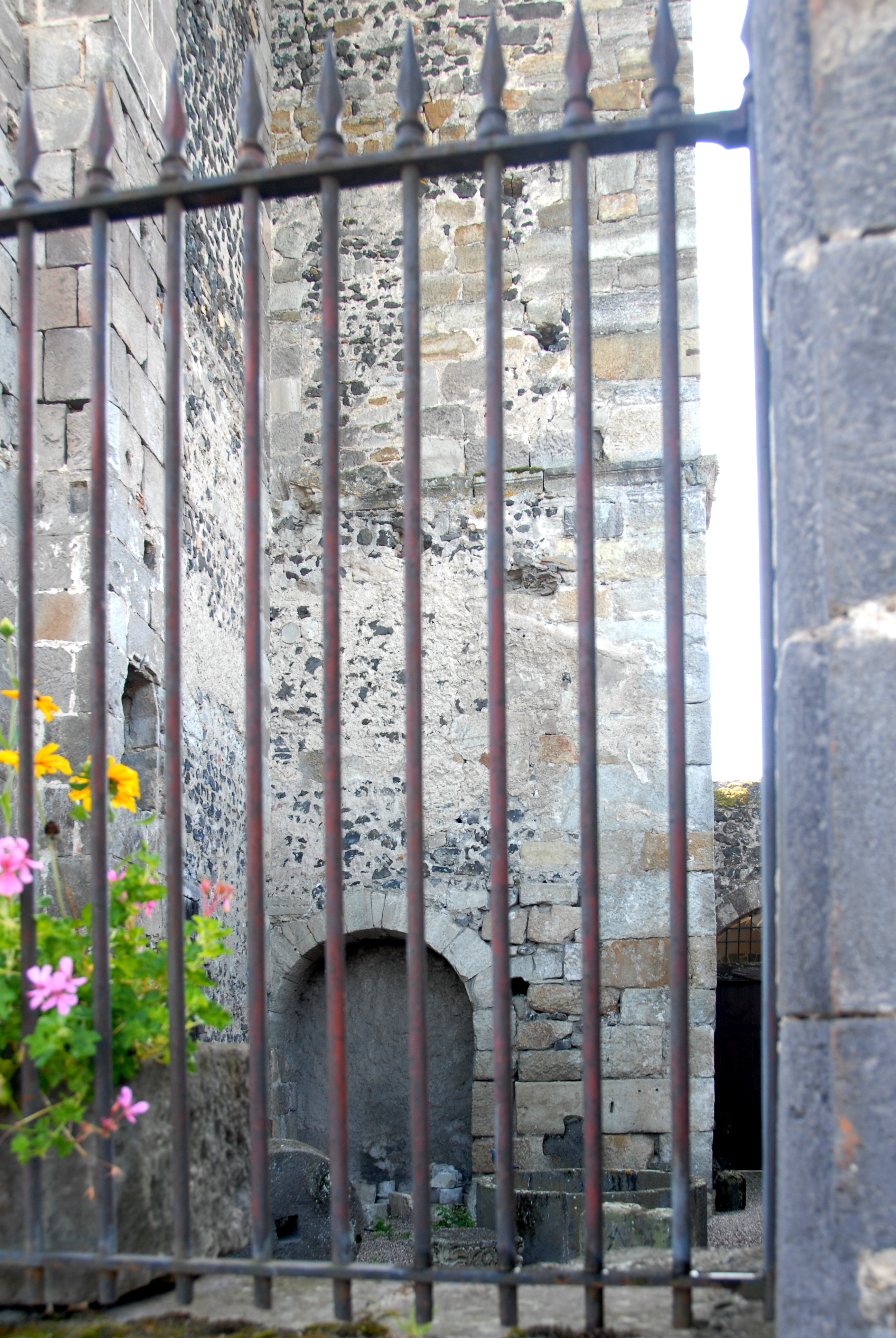 Mozat, Turmvothalle von N